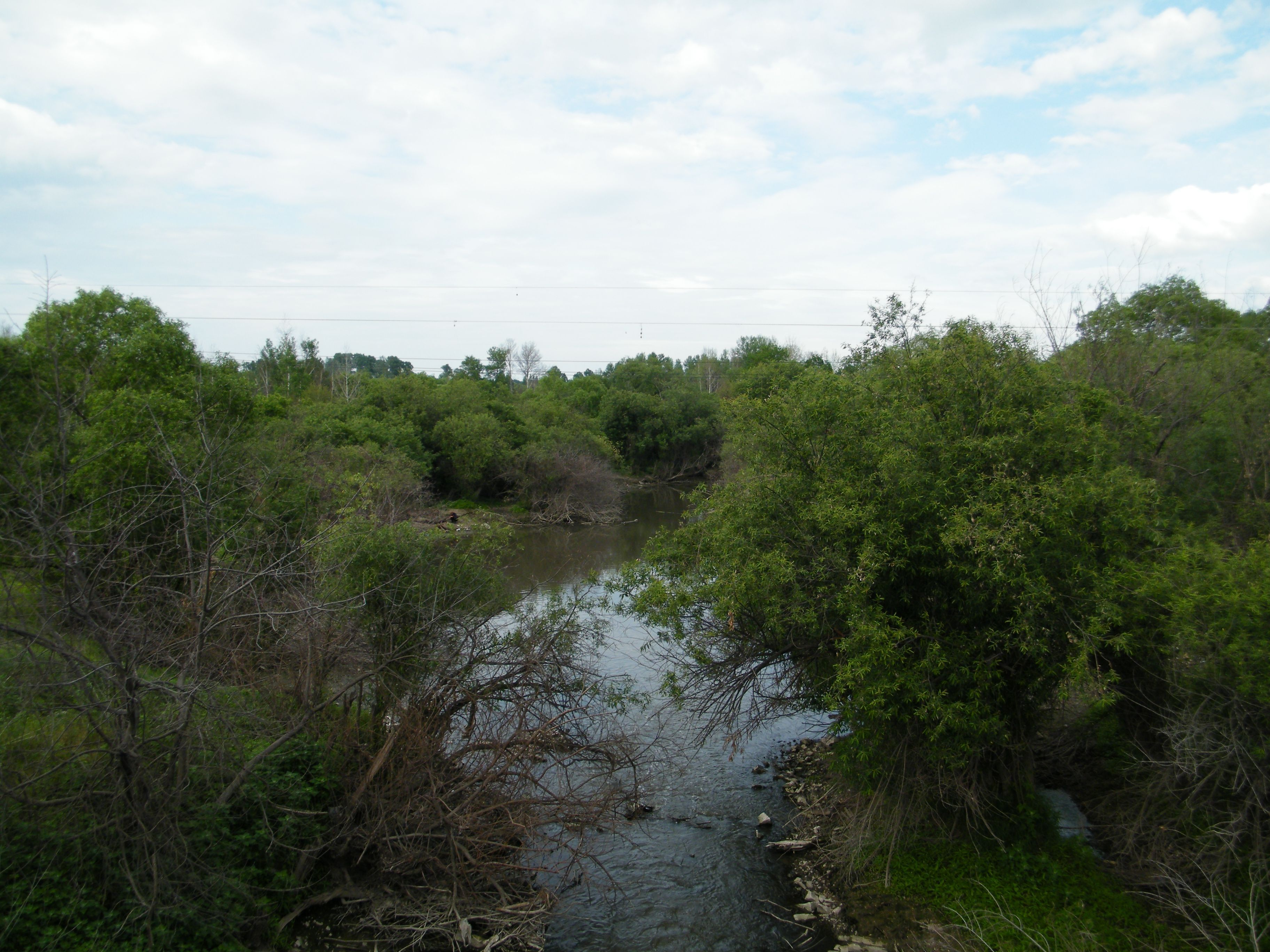 Река Черная Речка в окрестностях села Ровное Хабаровский район